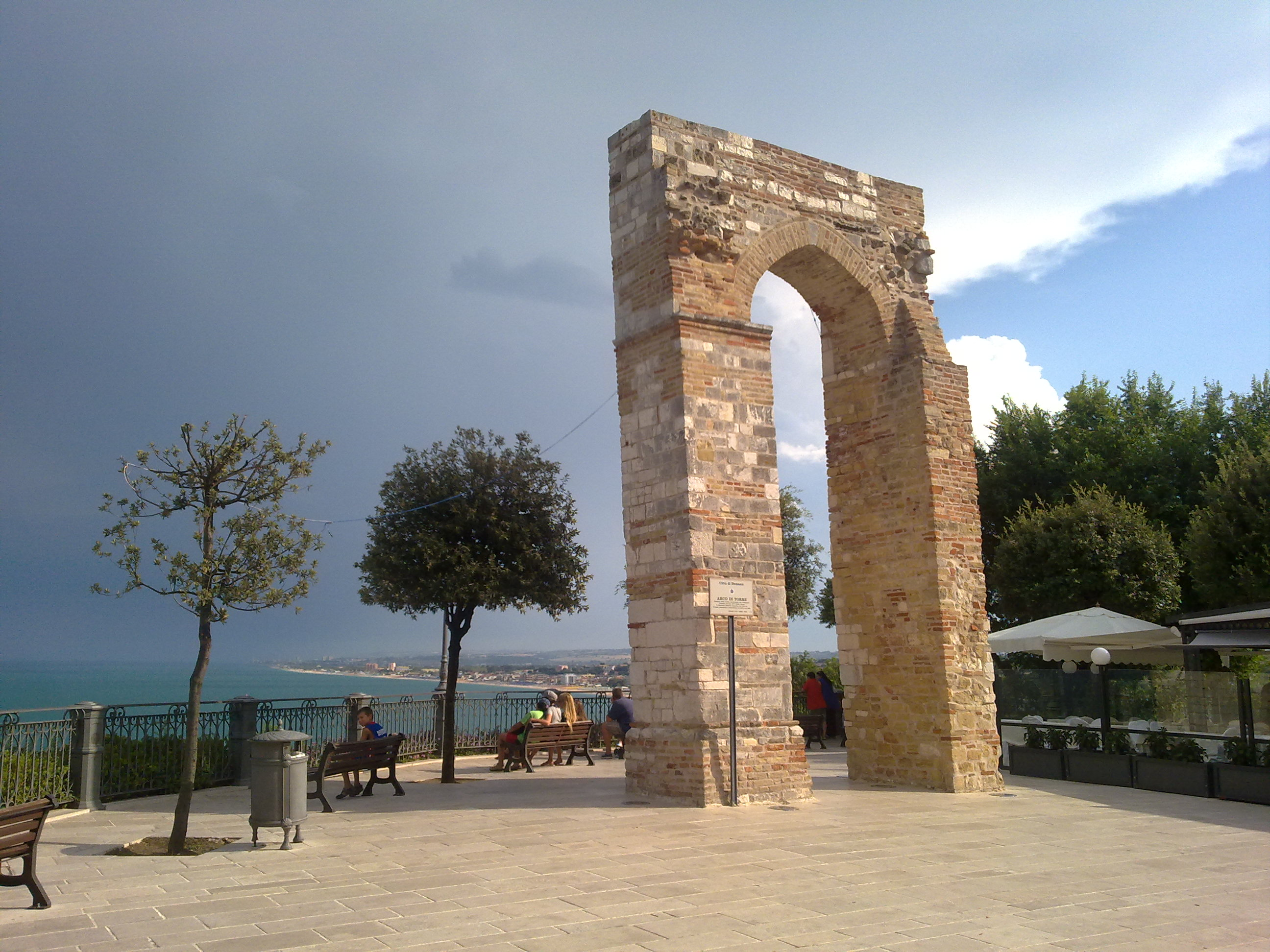 Arco di torre medioevale di Numana (AN)